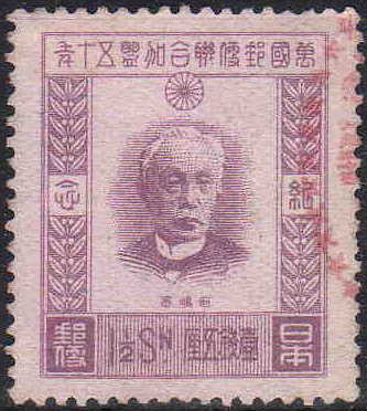 日本の万国郵便連合加盟50周年記念切手。描かれているのは前島密。